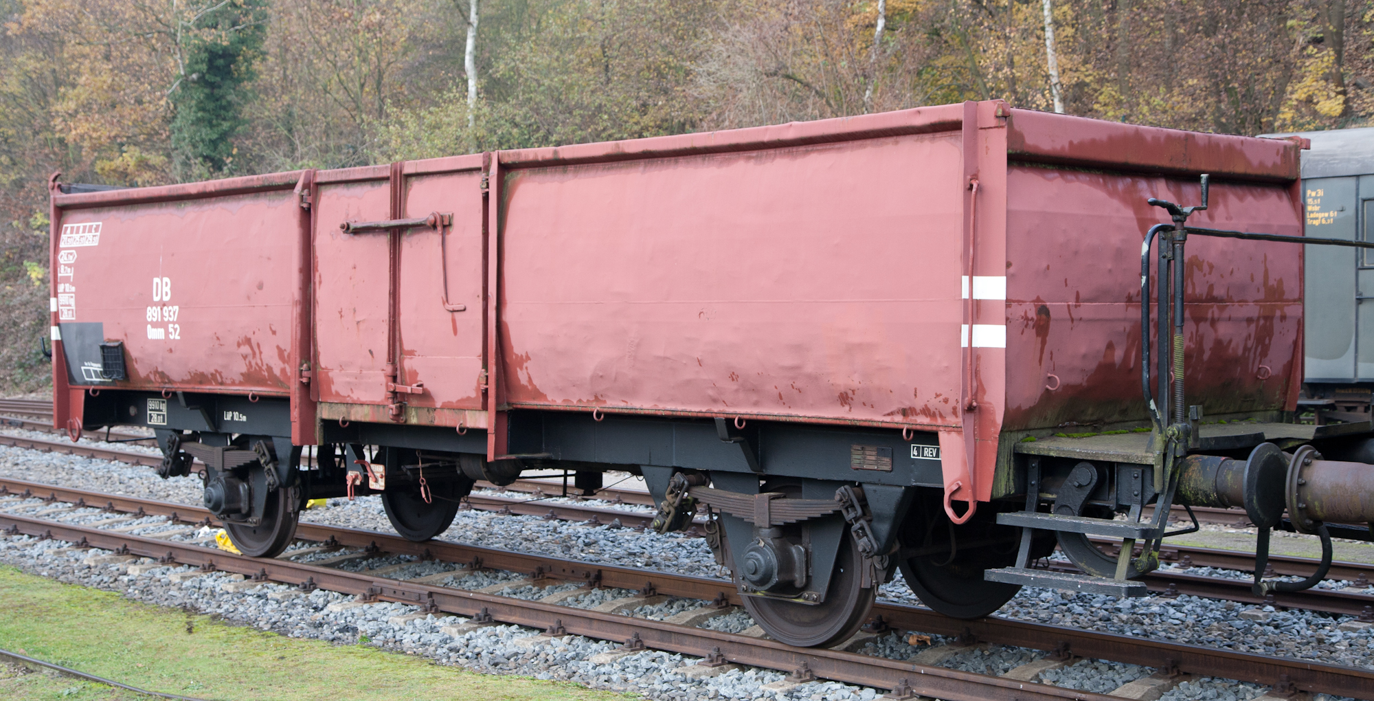 Offner Güterwagen der DB, Bauart Omm52